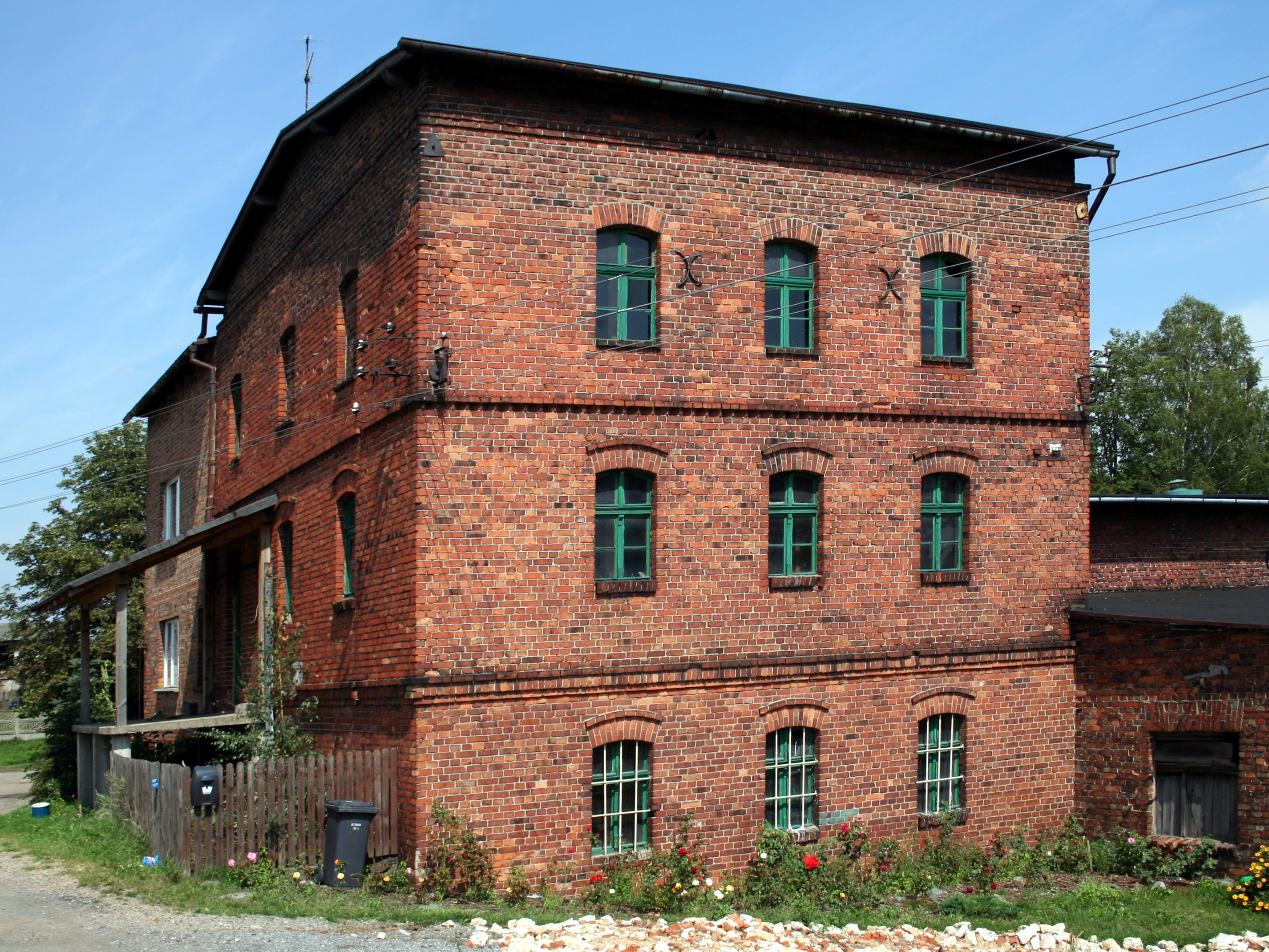 młyn w Kamieńskich Młynach, powiat lubliniecki